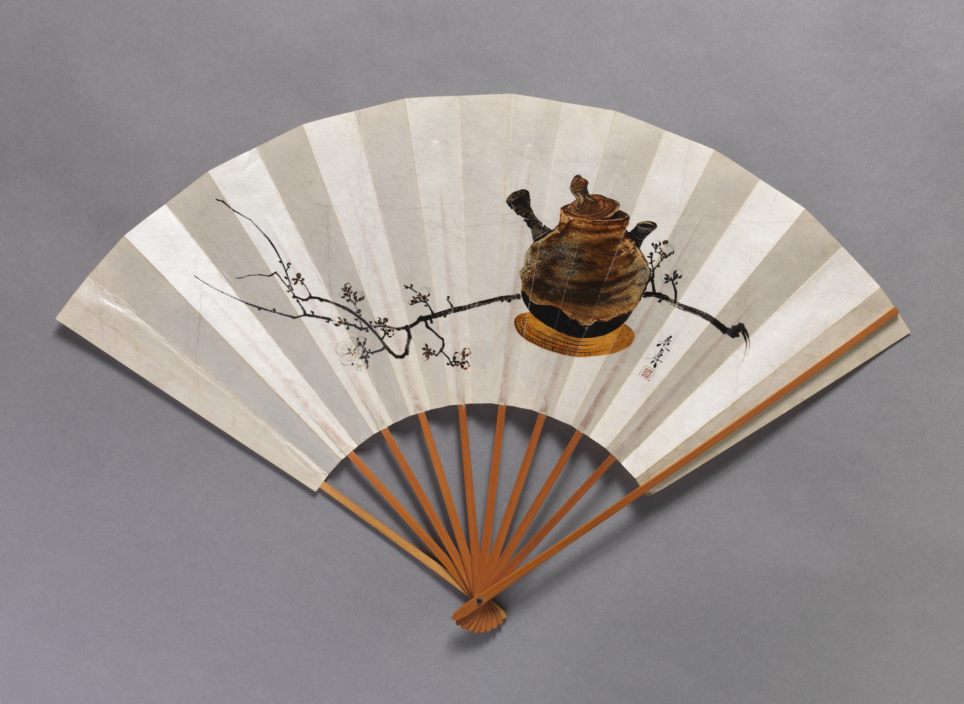 Japan; Folding fan; Paintings